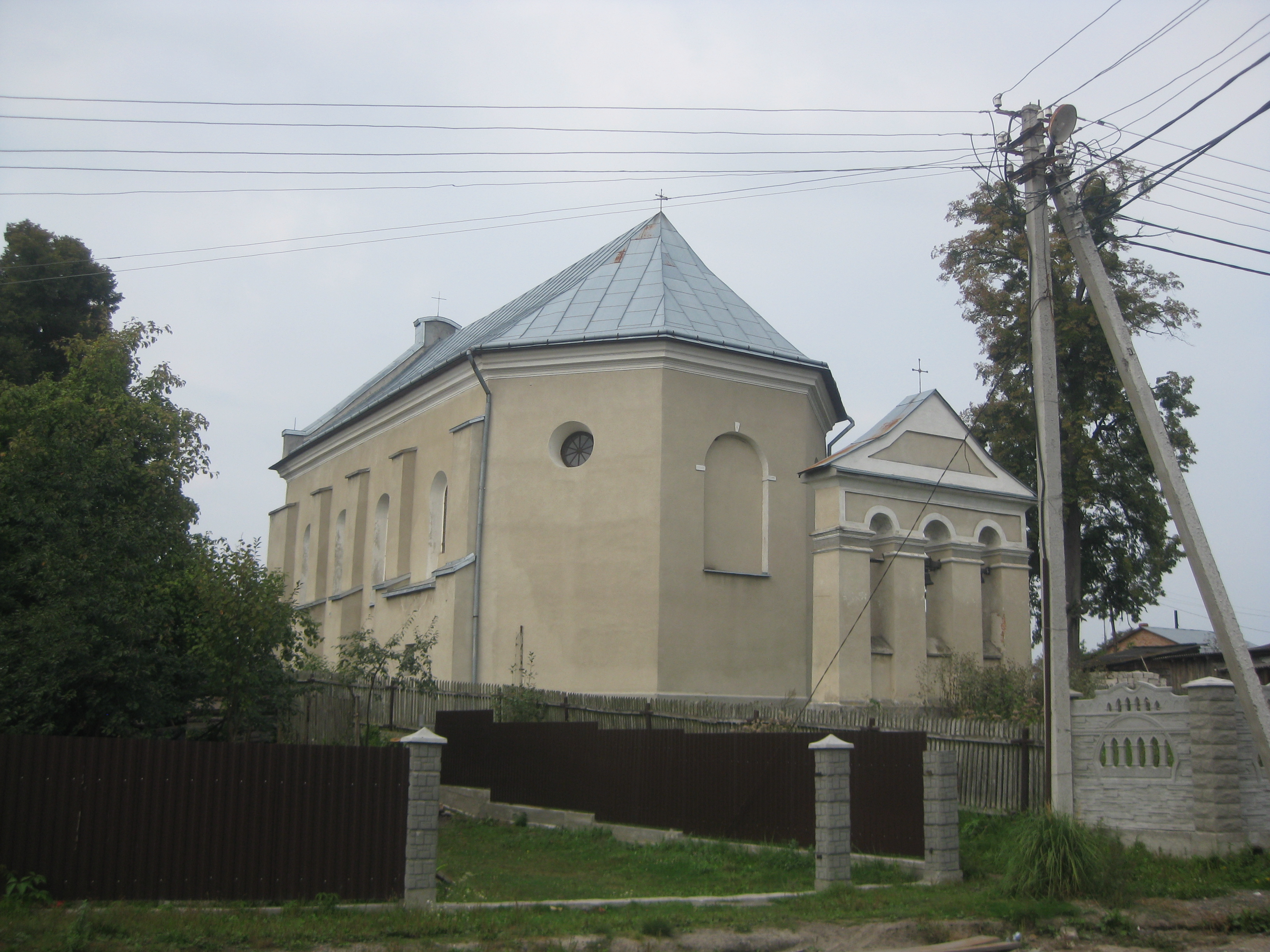 Костел Святої Трійці в смт. Немирів Львівської області. 1640 рік.